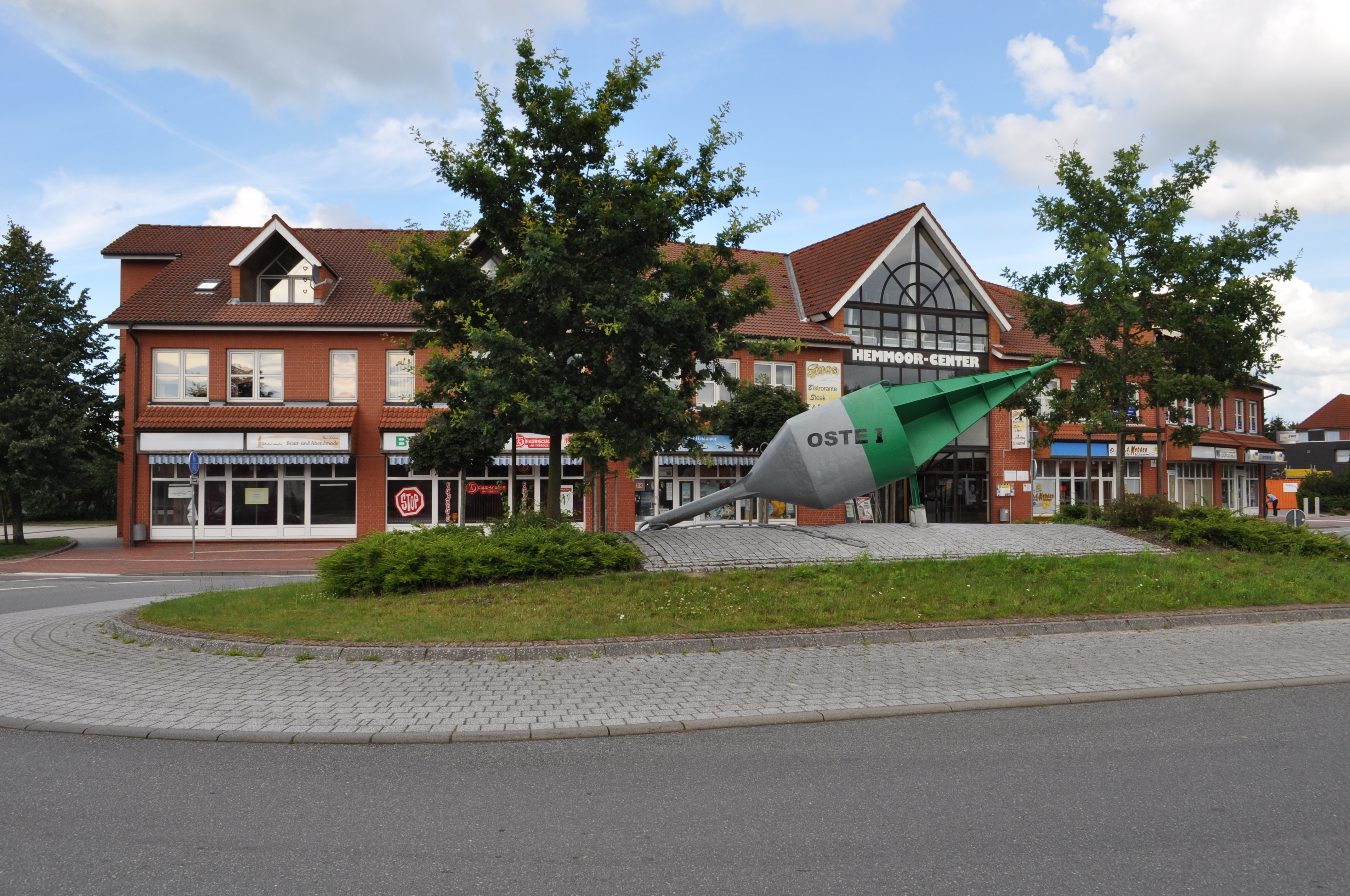 Kreisel vor dem Hemmoor-Center.